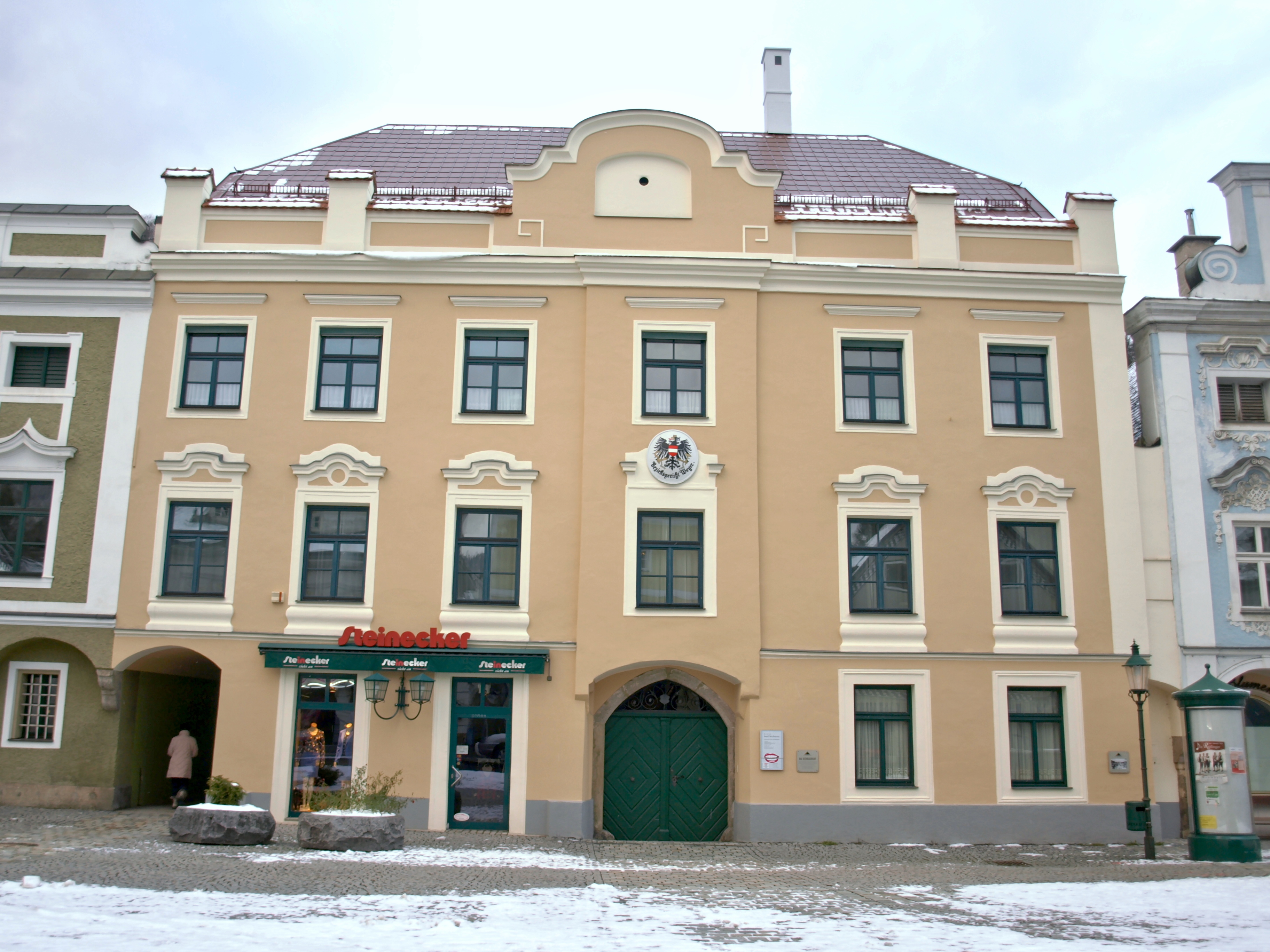 Bürgerhaus, Bezirksgericht